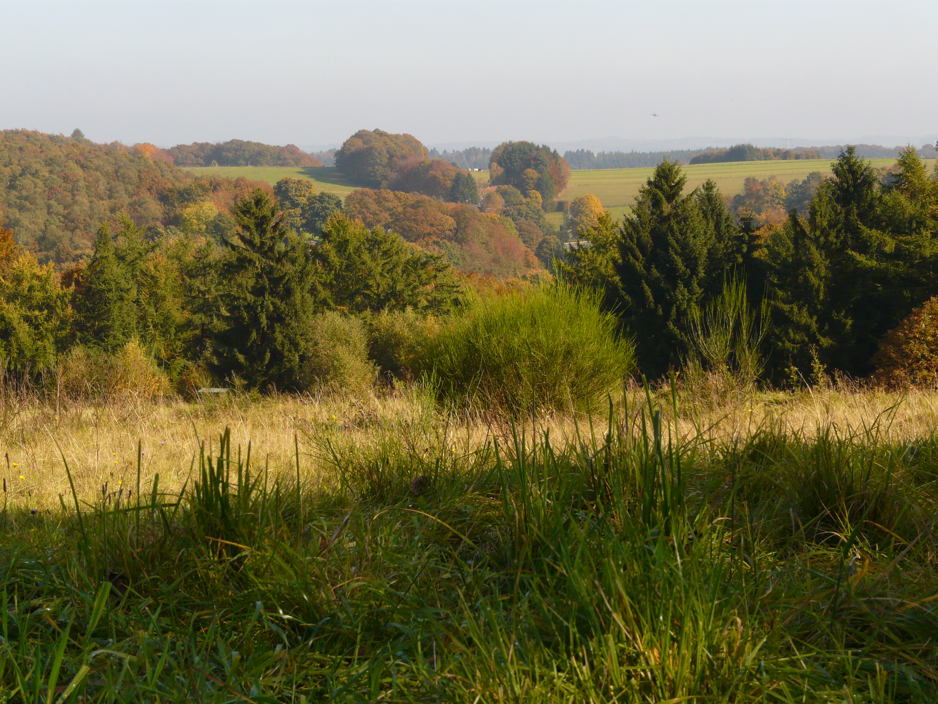 Typisch bergische Landschaft, Herbst im Niederbergischen Land